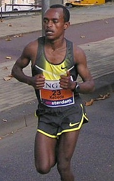 Kamiel Maase op weg naar een nieuw Nederlands record tijdens de Marathon van Amsterdam in 2007, vlak na het 35 km-punt. Naast hem, op de fiets, coach Bram Wassenaar. Links de Ethiopiër Tsegaye Kebede.